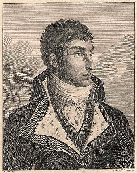 Gravure taille douce du Prince Jules de Polignac (1780-1847).